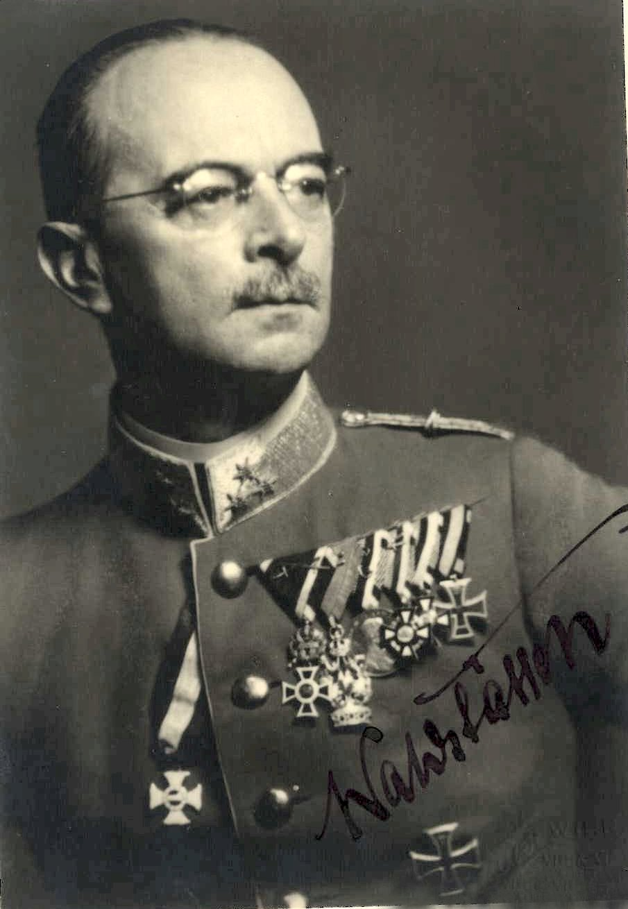 Egon Freiherr von Waldstätten 1922 mit MMTO